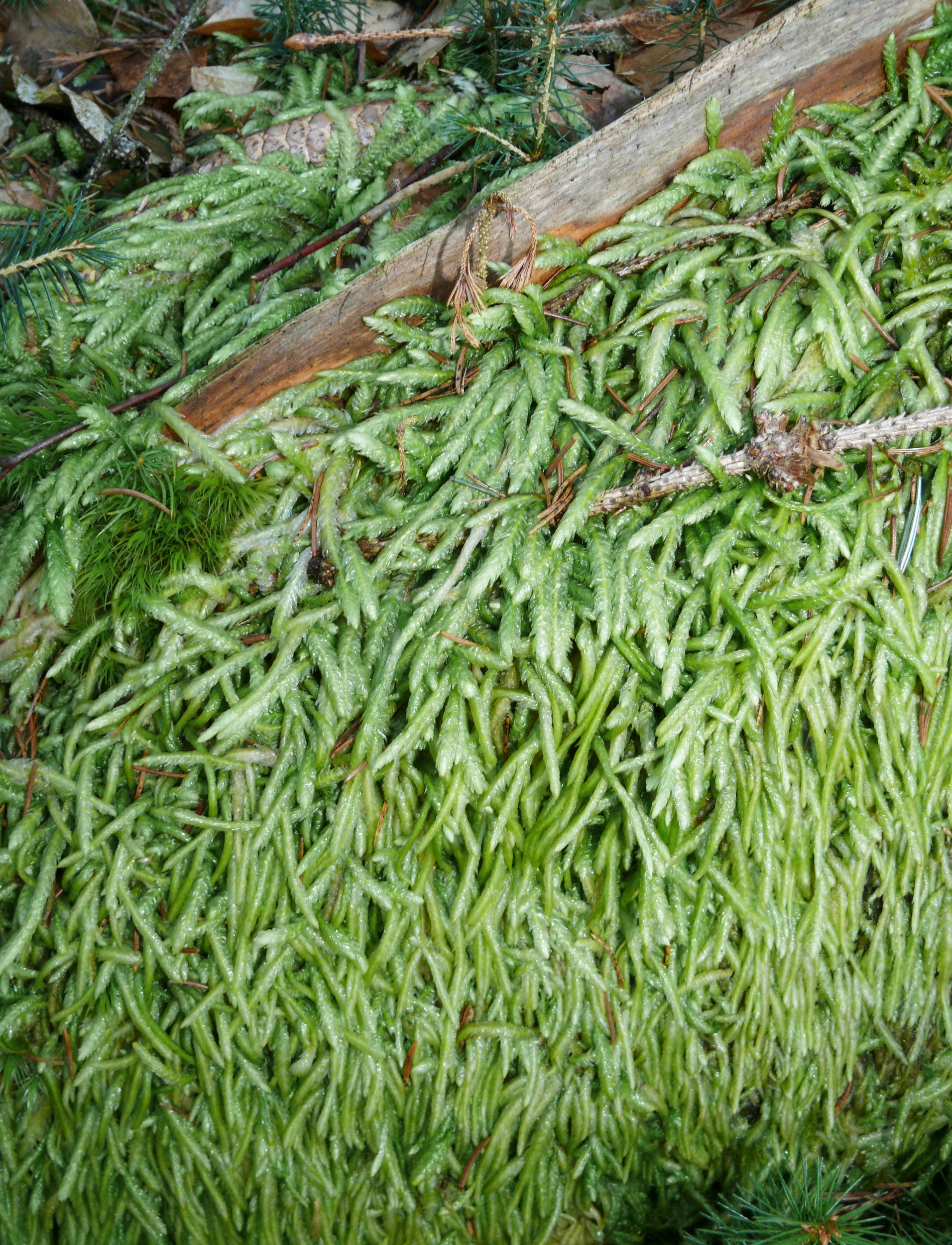 Plagiothecium undulatum, Schwäbisch-Fränkischer Wald, Germany